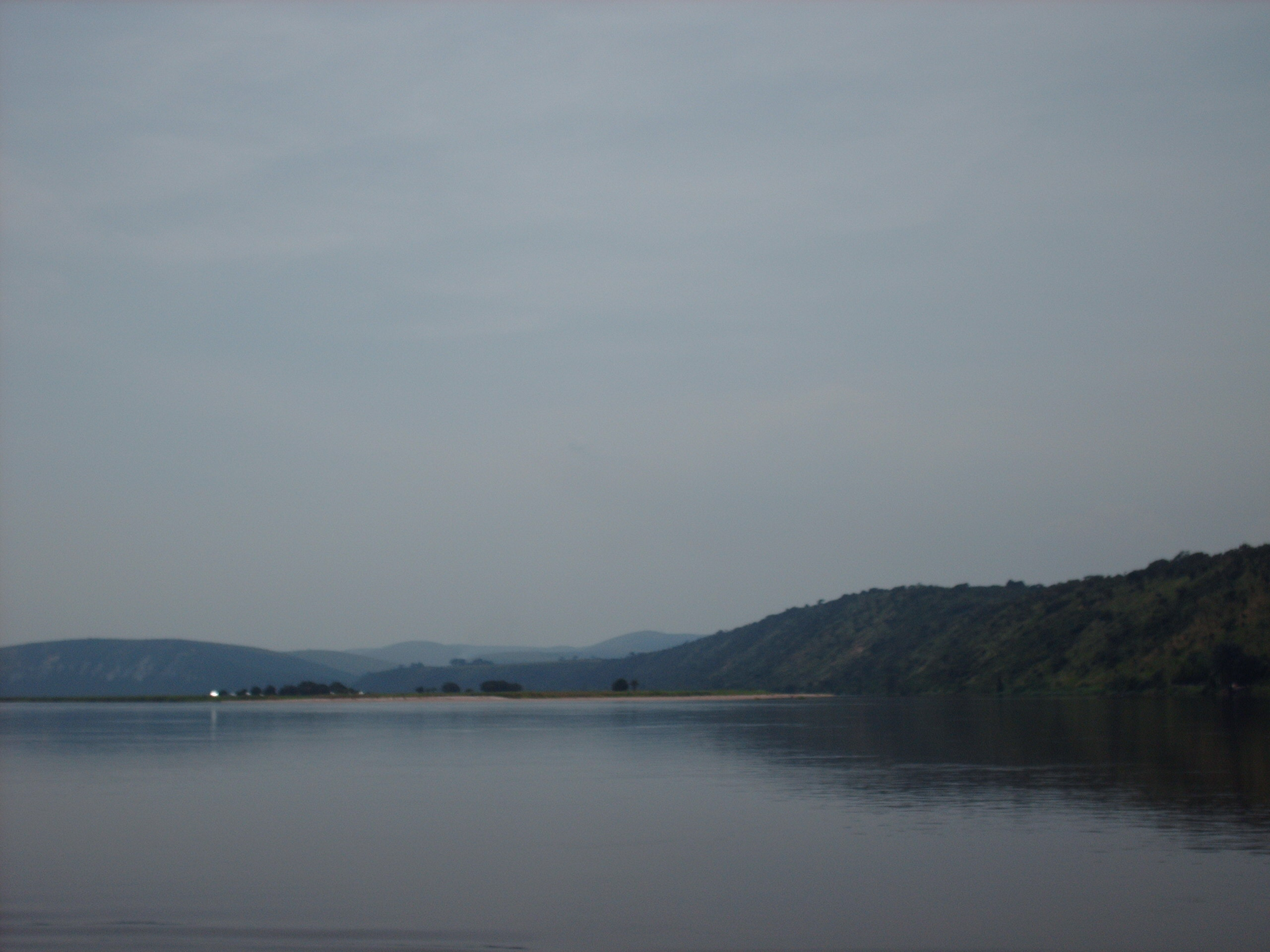 Rive Congo nord du Pool Malebo. Photo prise depuis une barge en route vers Brazzaville et Pool Department.